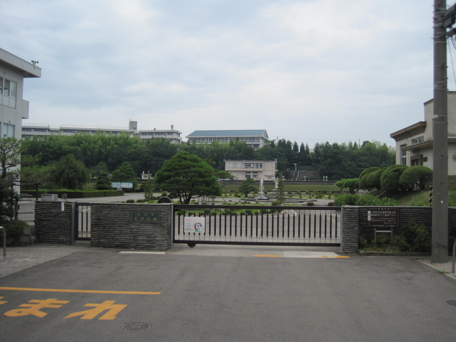 末浄水場（石川県金沢市）、金沢市企業局が管理する浄水施設で国の登録有形文化財の登録と、国の名勝の指定を受けている。